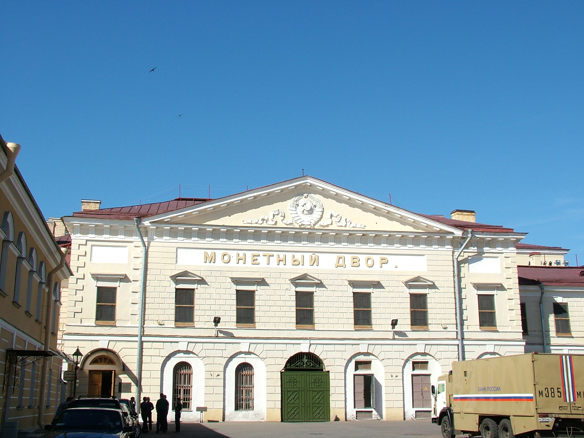 Mint in Peter & Paul Fortress. St.Petersburg, Russia.